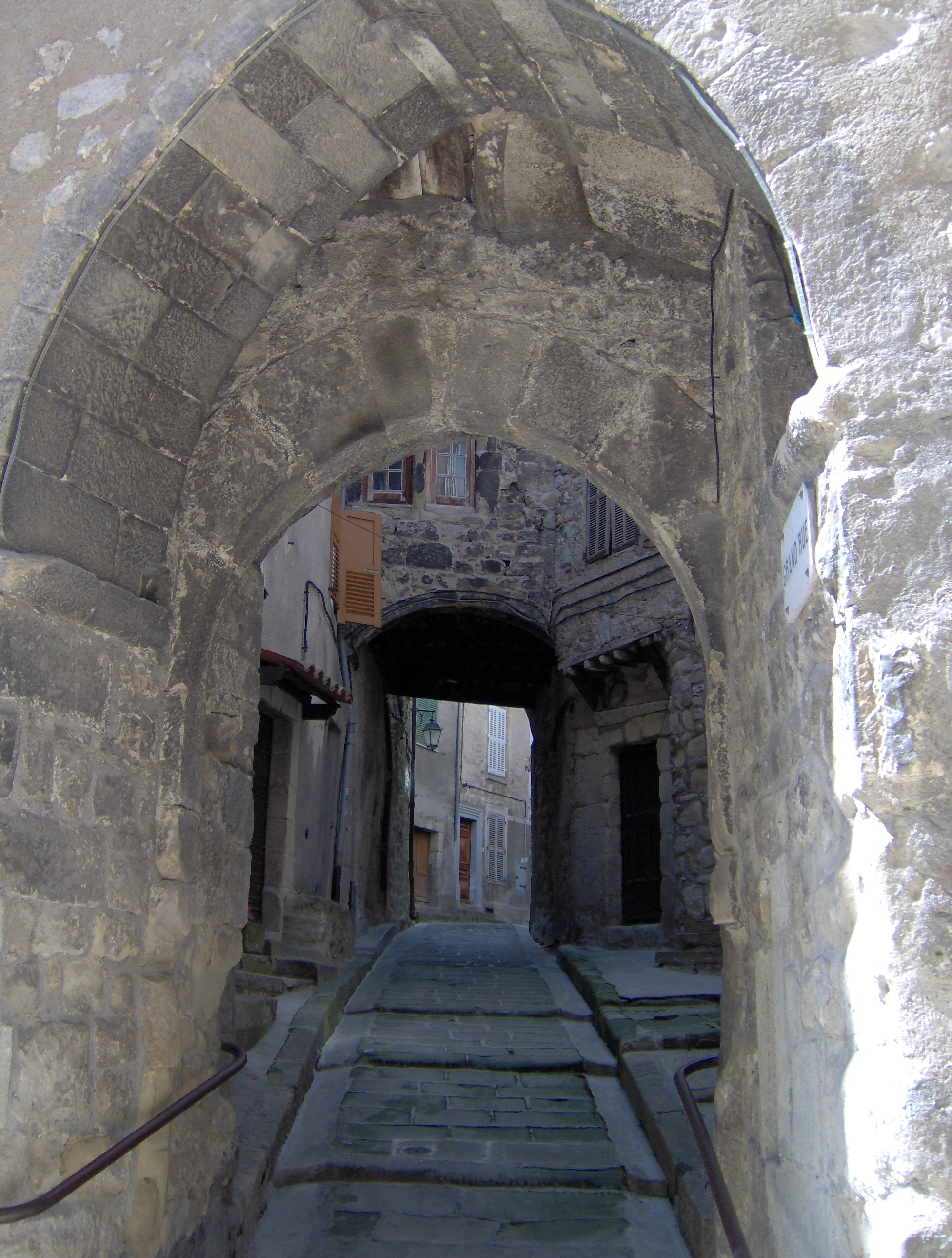 Grand'rue d'Annot vieux village photo prise par G.Bertothy